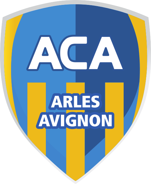 AC Arles-Avignon logosu.